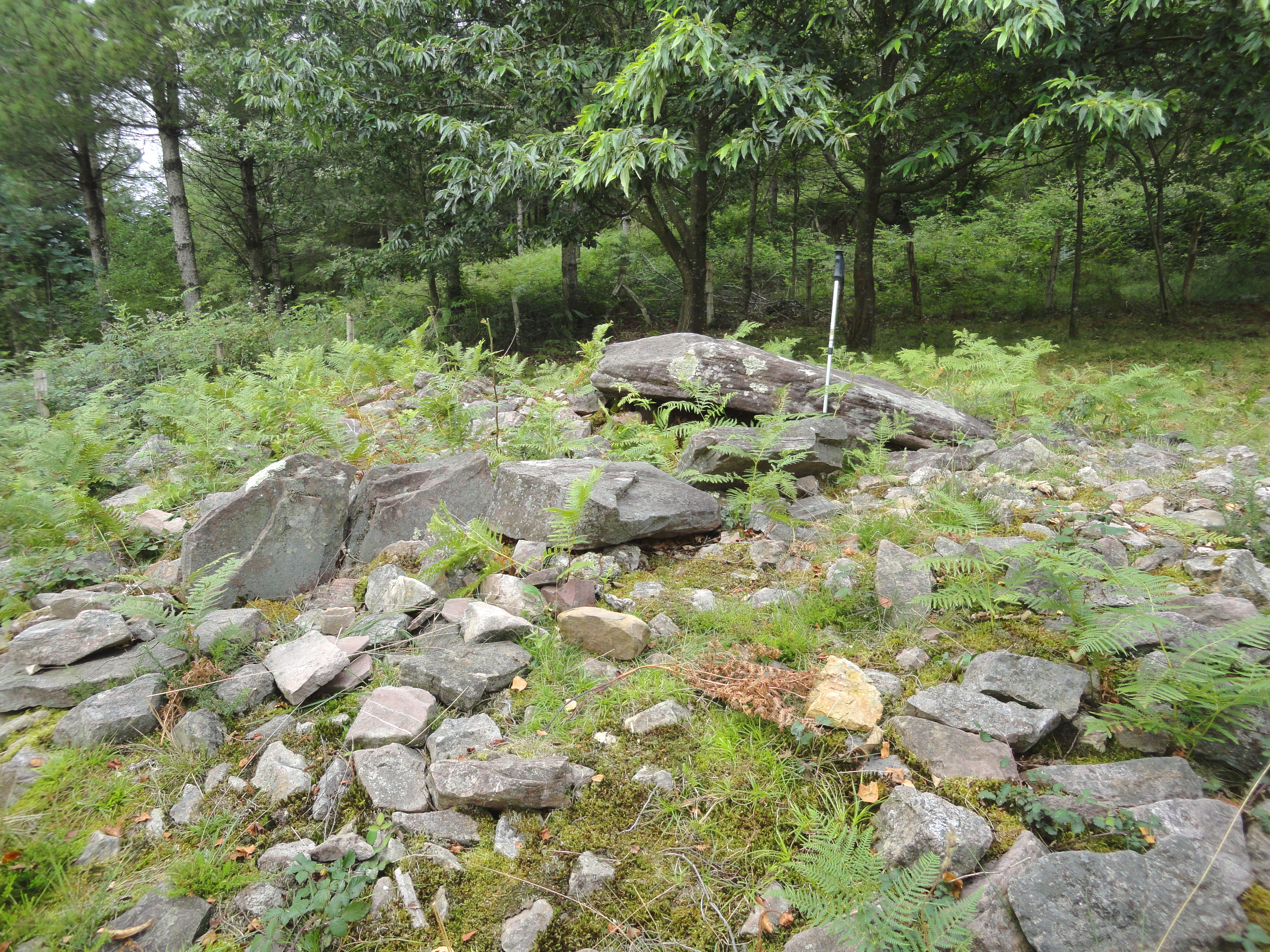 Igoingo lepua I trikuharria